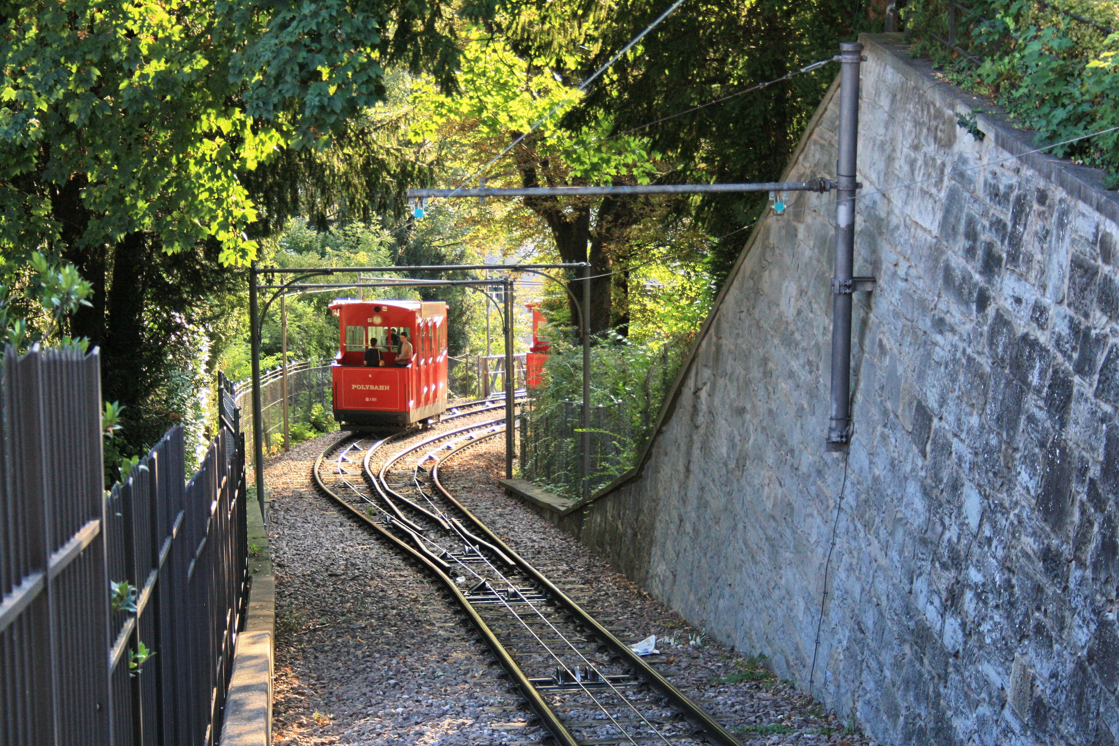 Polybahn in Zürich (Switzerland) near ETH Zurich (Polyterasse) hill station